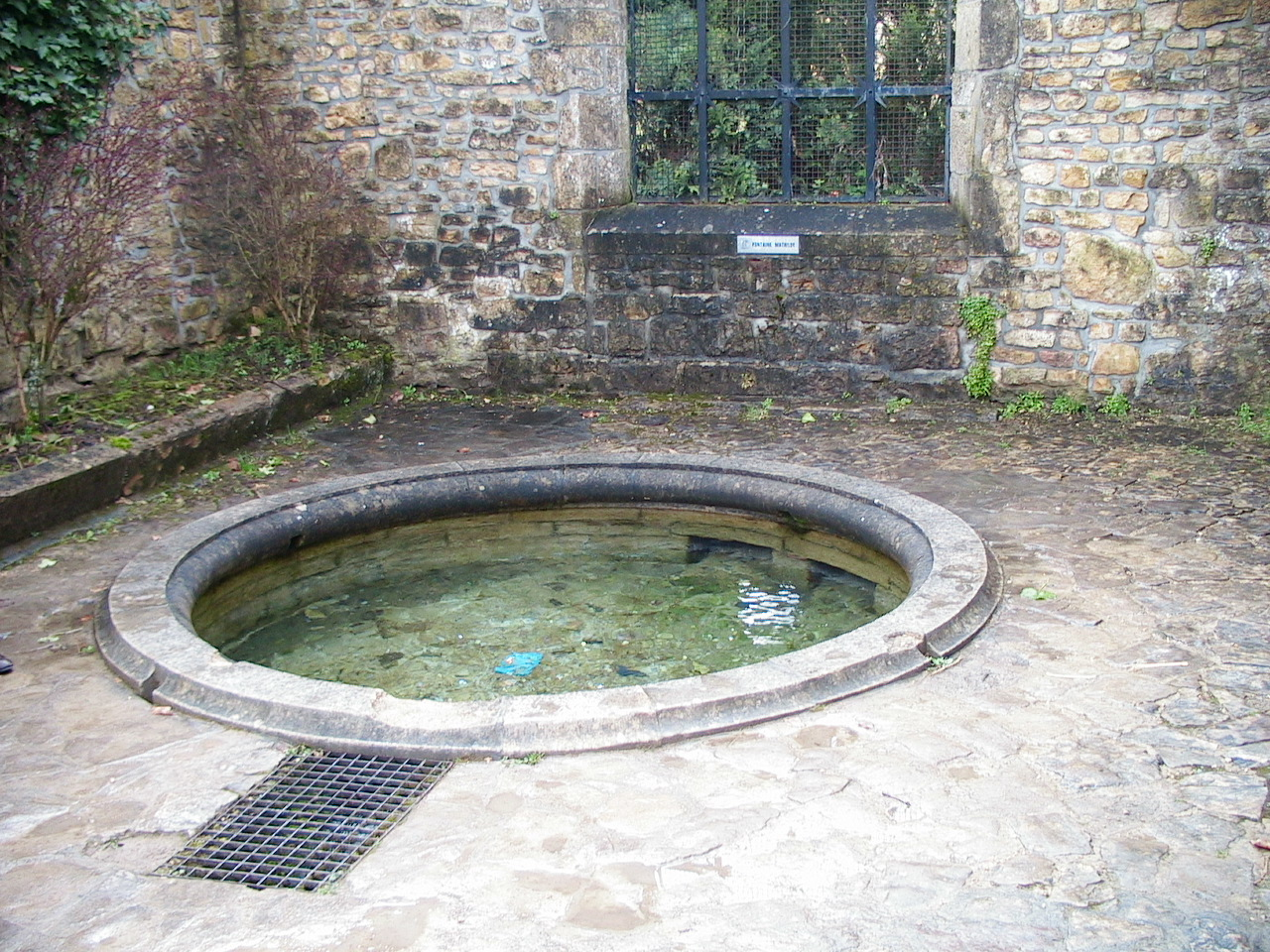 La fontaine « miraculeuse » Mathilde à l'abbaye d'Orval (Belgique).